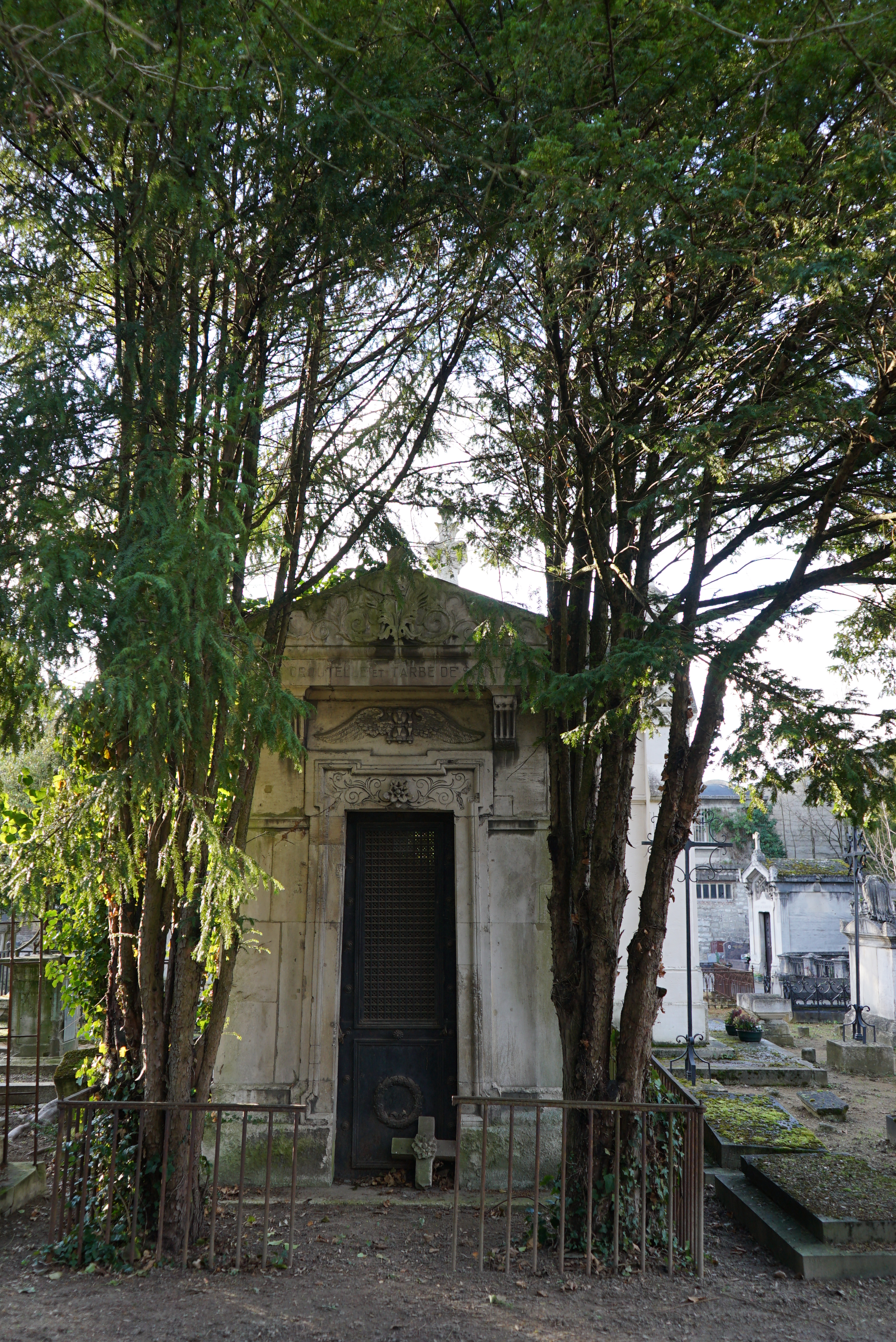 concession Croutelle Tarbé de saint-Hardouin dans le canton 3.